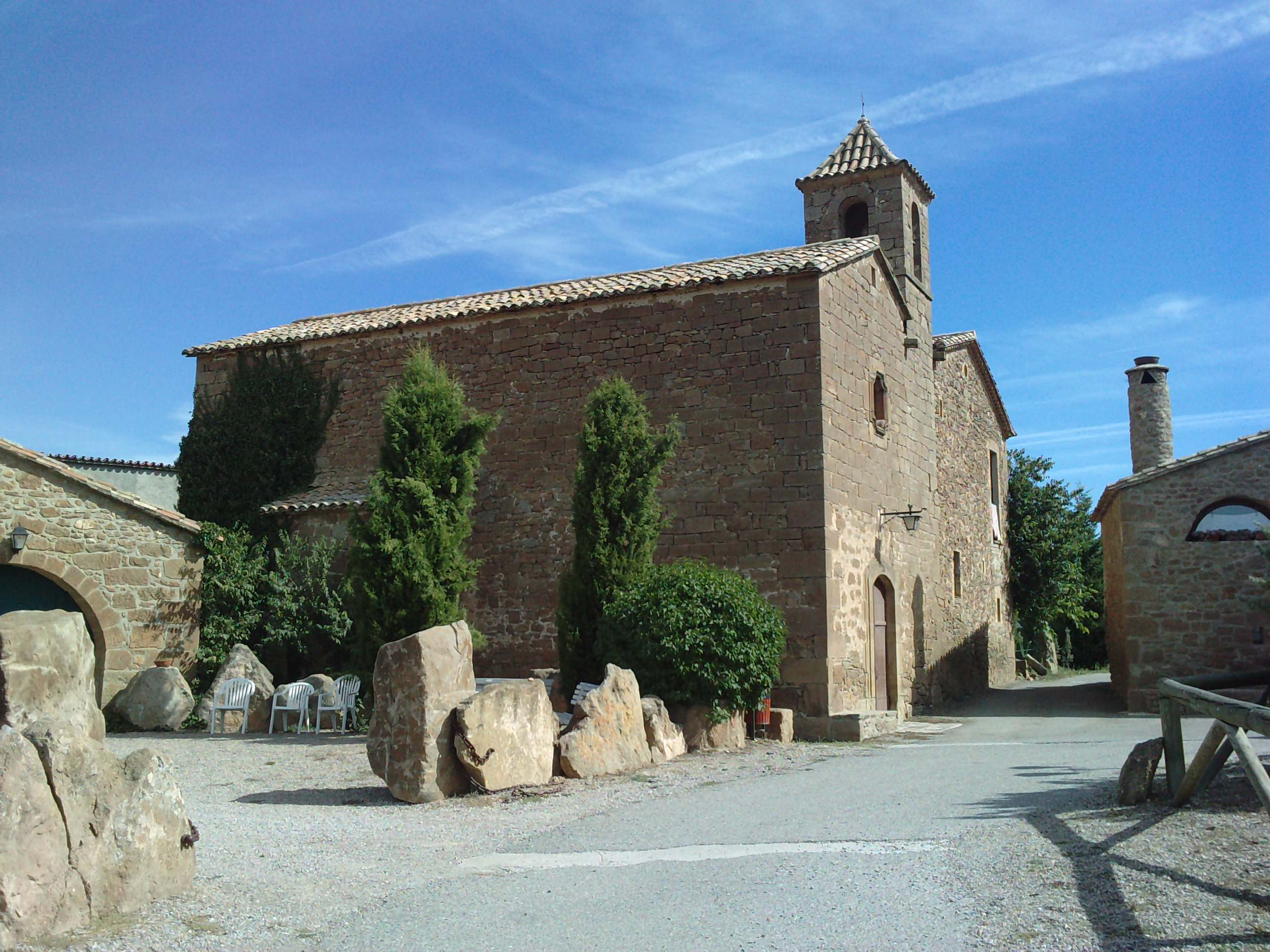 Brics, entitat de població d'Olius, Solsonès, Catalunya